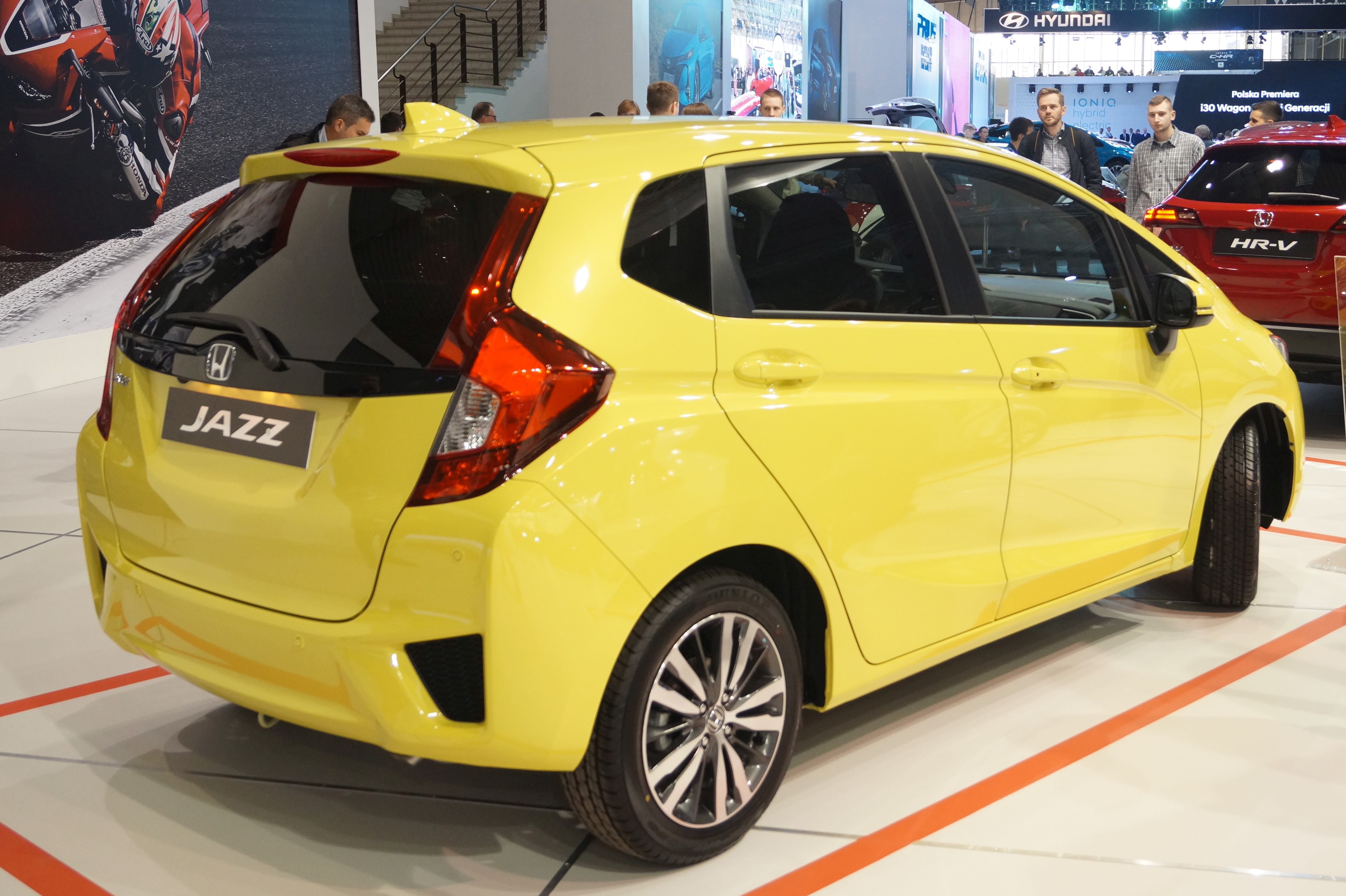 Prawy tył Hondy Jazz na Motor Show Poznań 2017.